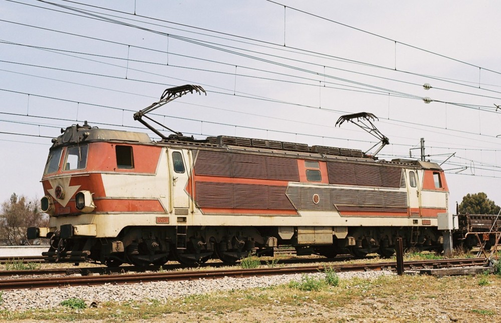 ONCF E 1006 à Sidi Yaya du Rharb. Arrivées en 1976 sur le réseau marocain, ces machines débarquent de Pologne où elles sont connues sous le nom ET22, et où la tension d'alimentation de 3 kV -DC est identique. Conçues pour la traction de frets lourds elles seront aussi en tête de rames voyageurs, avec une vitesse de pointe à 125 km/h. Leur réforme a lieu mi-années 2000.